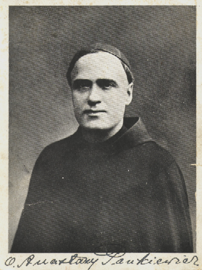 Anastazy Pankiewicz